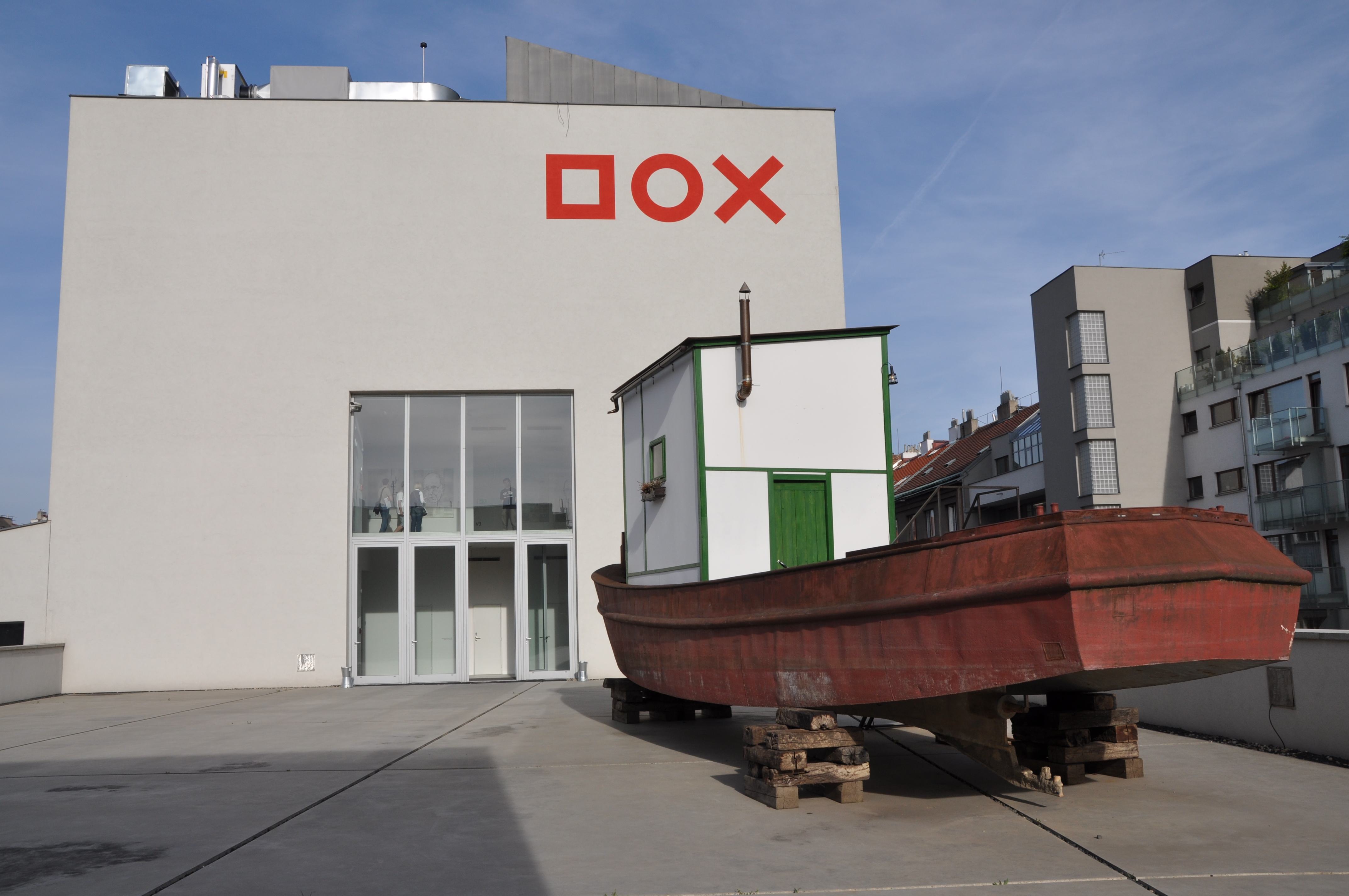 Centrum současného umění, Praha